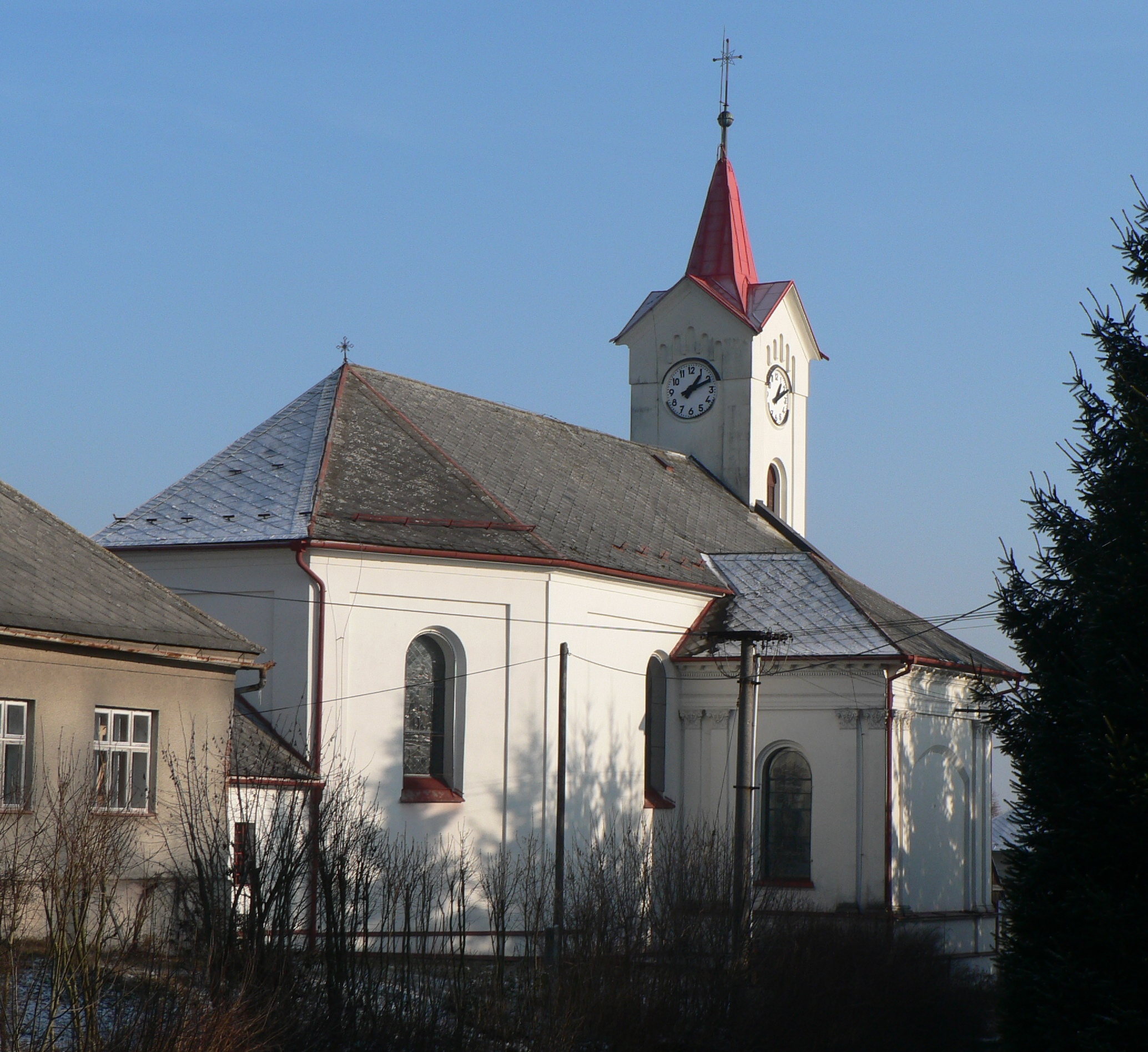 Kostel Nanebevzetí Panny Marie (Svébohov)